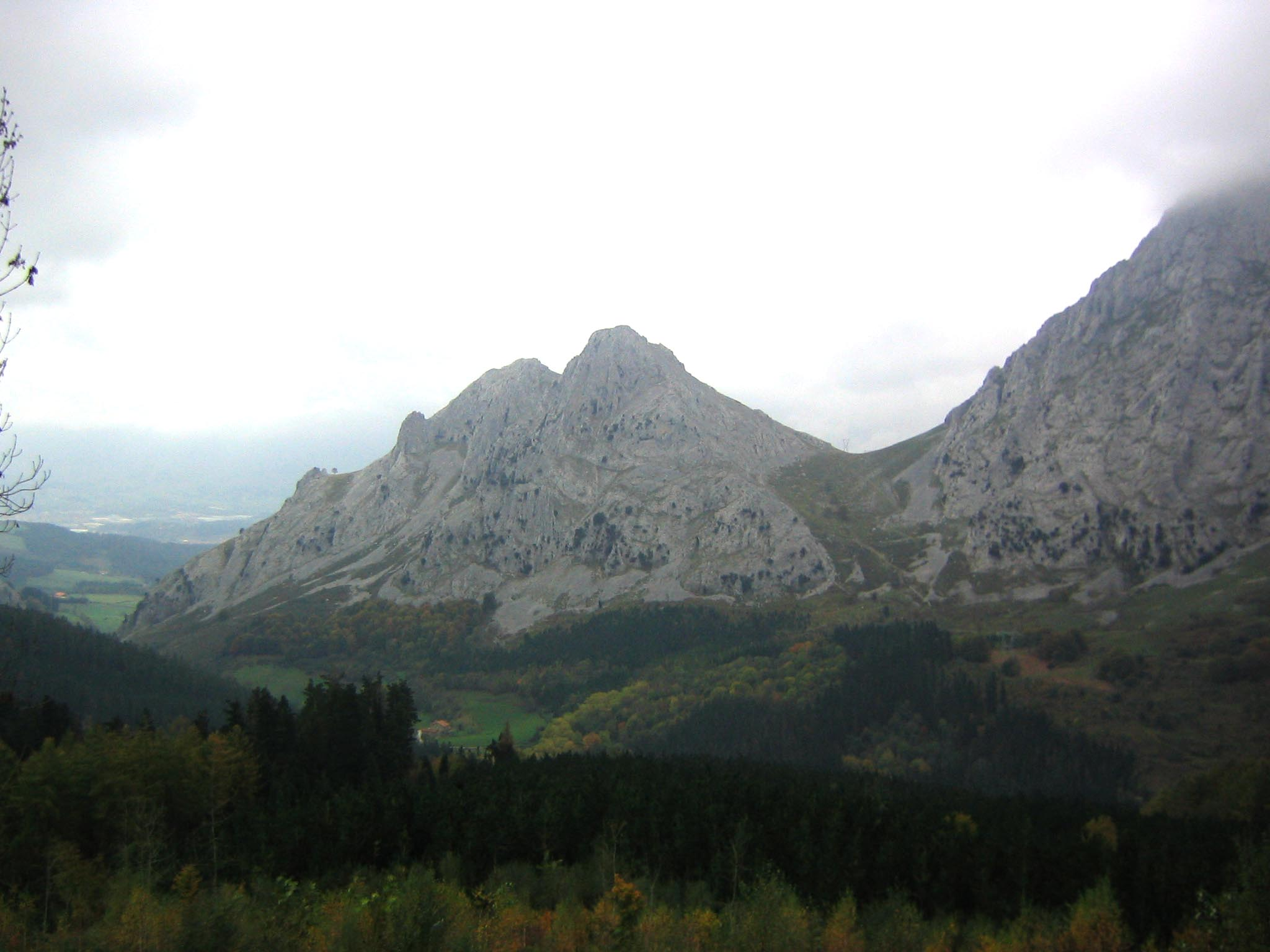 Montaña Aitz Txiki, cara sur Abadiano, Vizcaya, País Vasco, España.